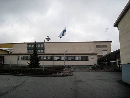 Uusimaa, Finland